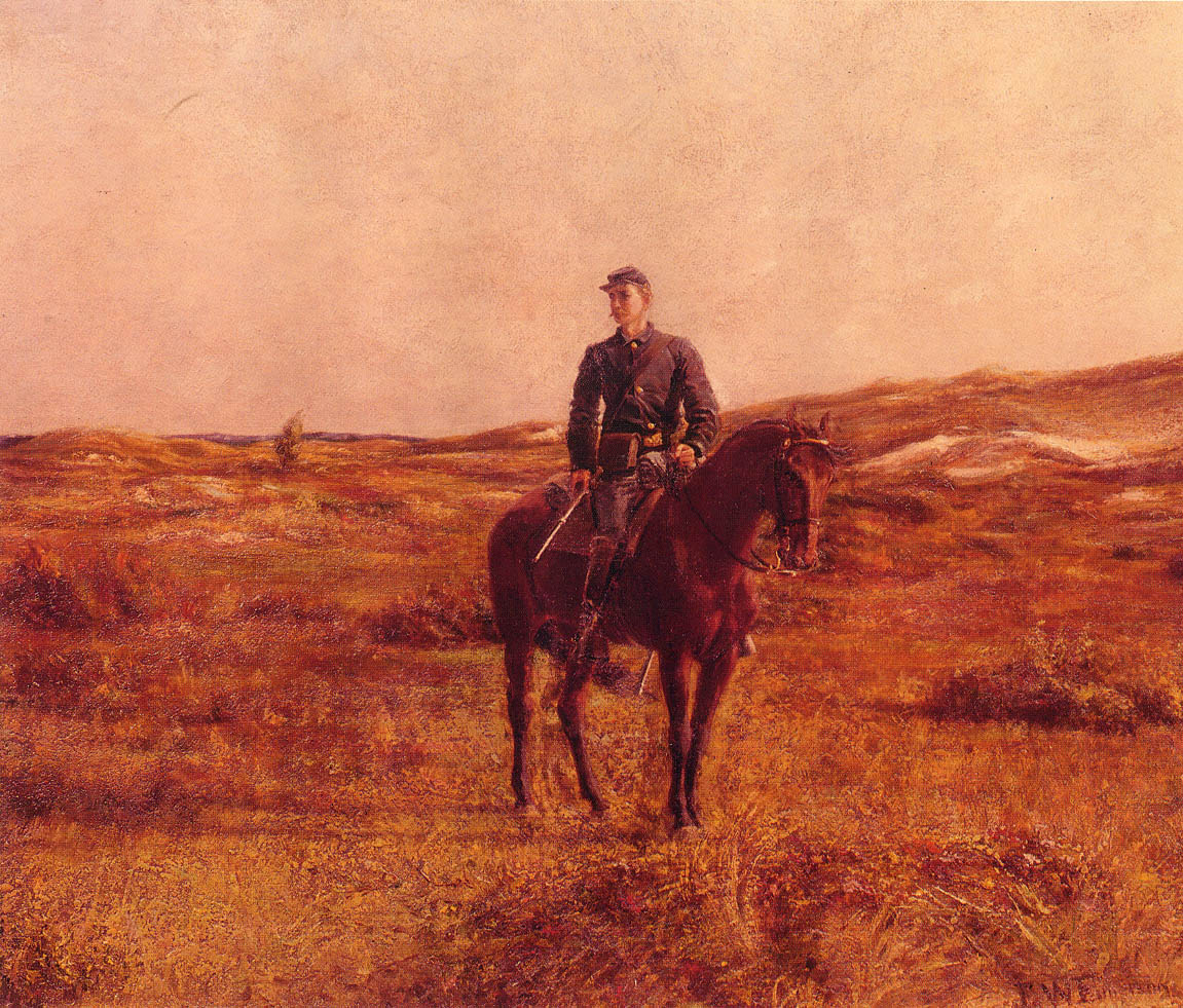 Tableau représentant un soldat de la cavalerie américaine dans l'Ouest, 1866-1870